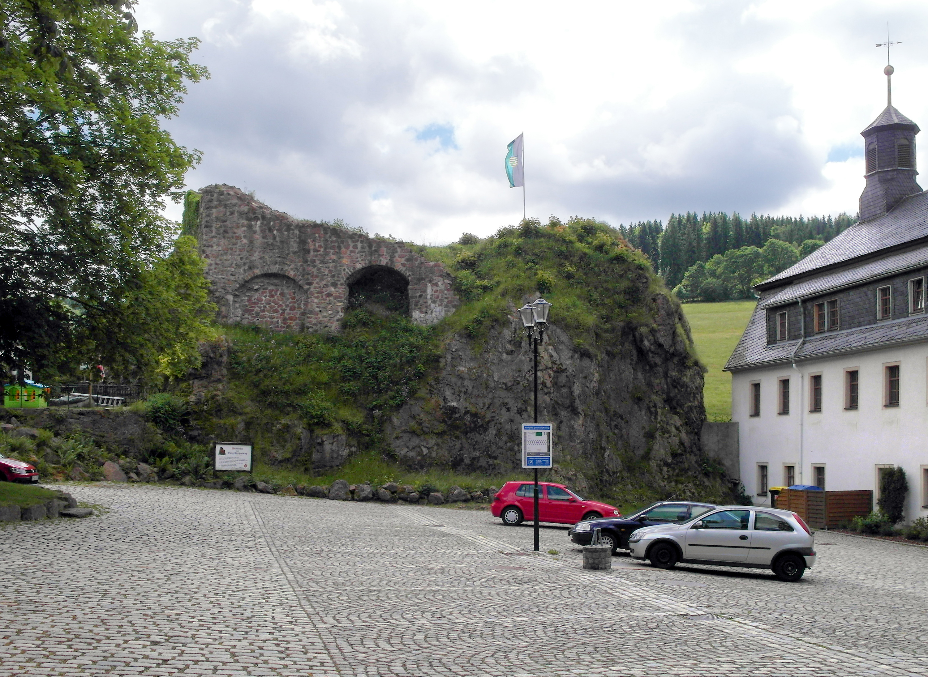 17.06.2017 09623 Rechenberg (Rechenberg-Bienenmühle) An der Schanze 1 (GMP: 50.736078,13.556243): Die Burg wurde erstmals 1270 urkundlich mit Apitz de Rechenberg erwähnt. 1586 vernichtete ein Feuer die Oberburg. Unter Heinrich von Schönberg entstand das 1605 vollendete Herrenhaus (GMP: 50.736335,13.555915) zu Füßen des Burgberges. Seit 1877 im Besitz der Gemeinde Rechenberg und als Schulhaus genutzt. Ab 1993 Sitz der Gemeindeverwaltung (Rathaus). Hofseite. [SAM0437.JPG]20170717235DR.JPG(c)Blobelt